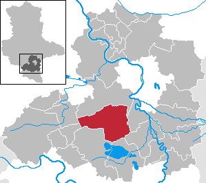 Bad Lauchstädt in Saxony-Anhalt - Saalekreis